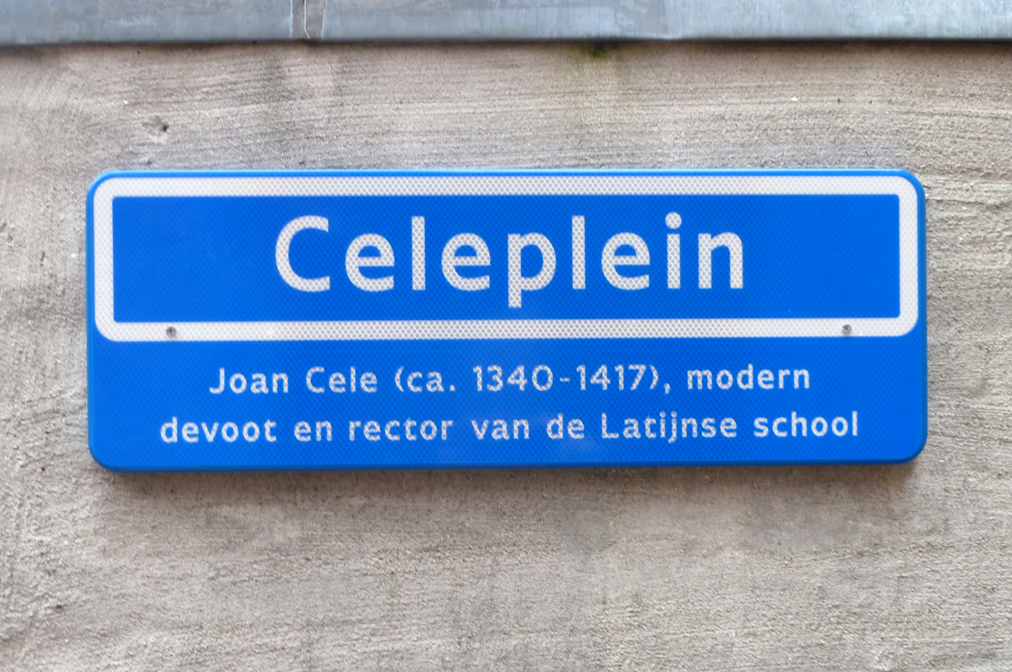 Straatnaambordje in Nederland